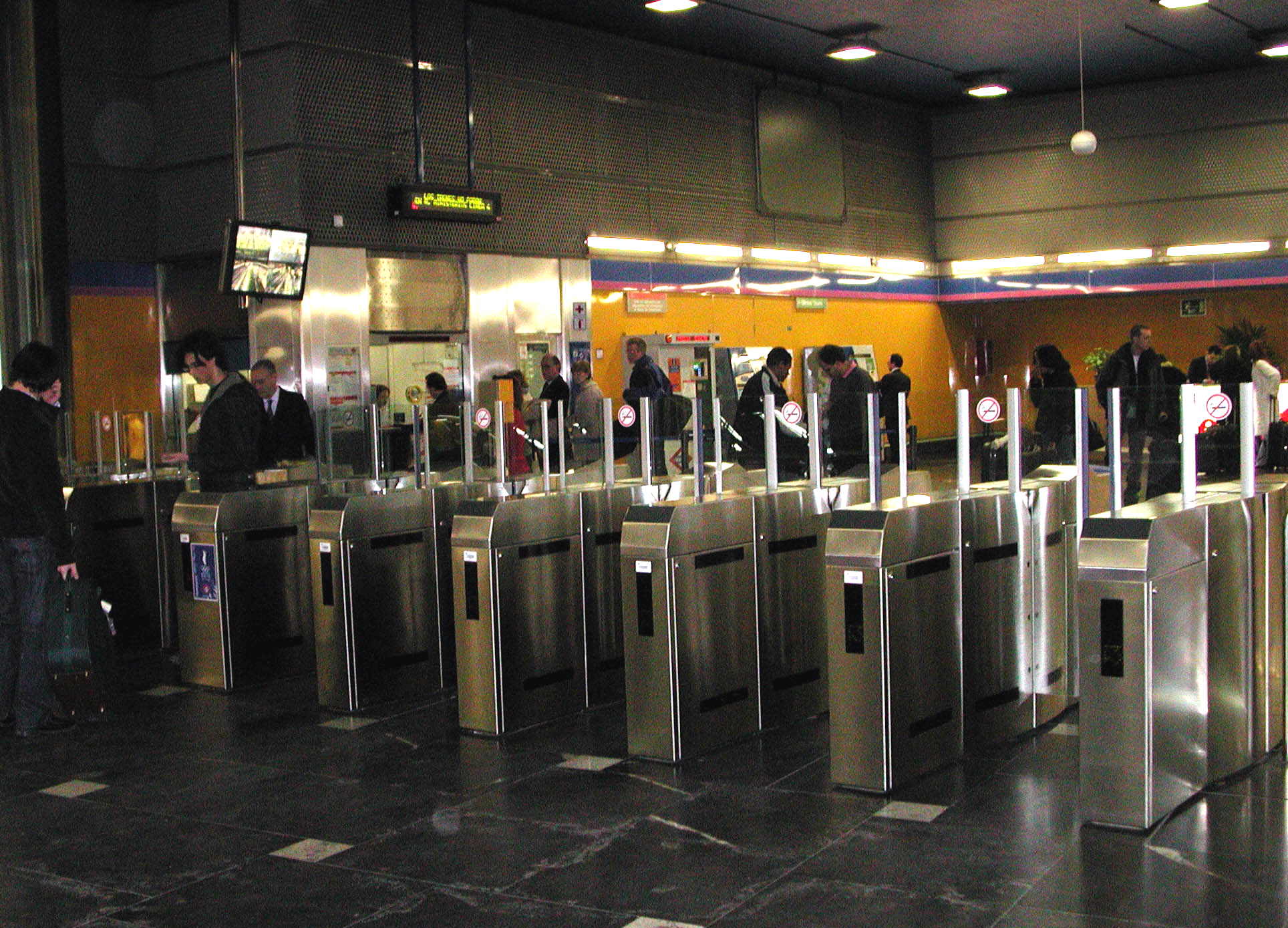 Poortjes Metro Madrid